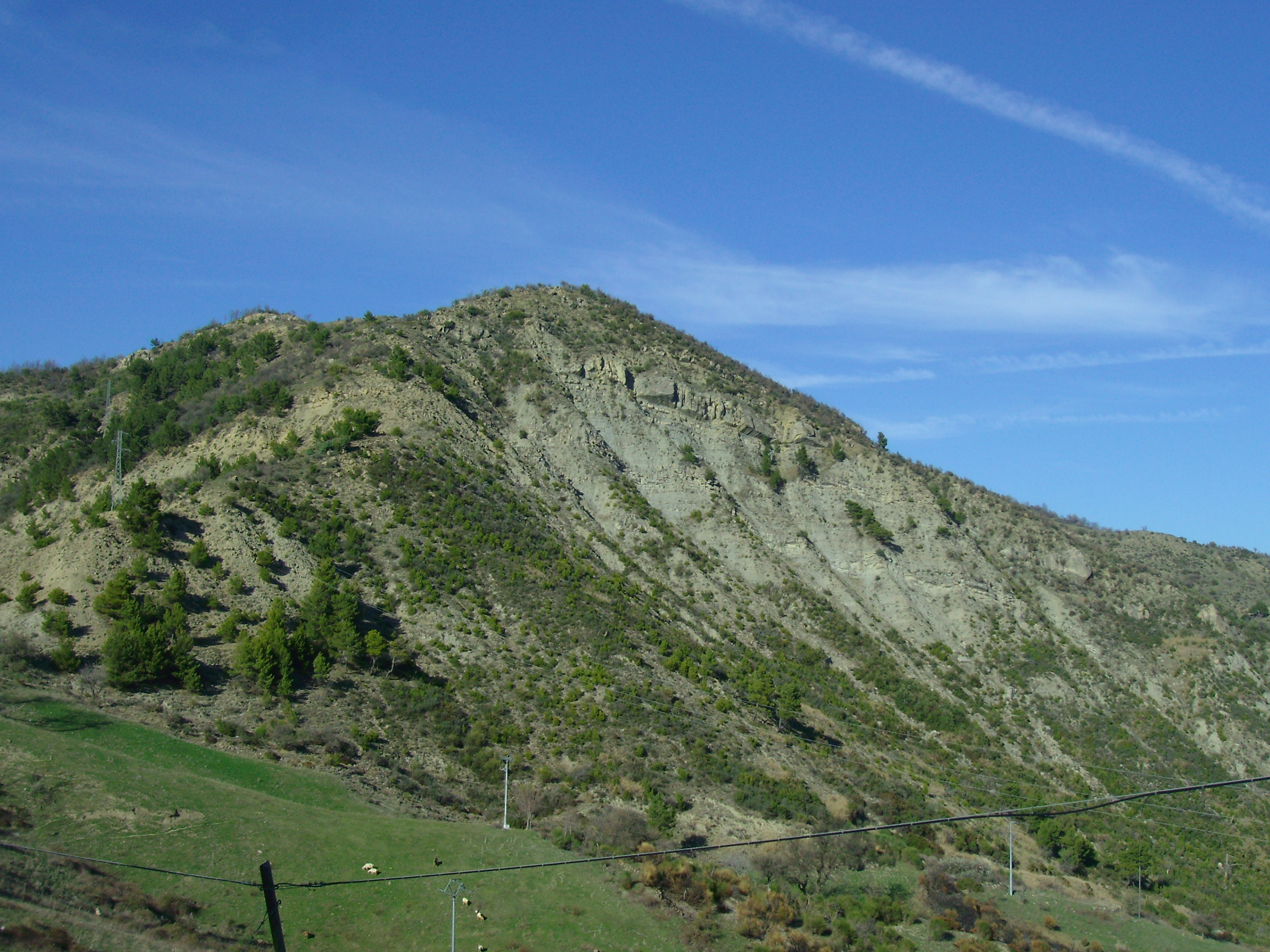 Timpa Recolla